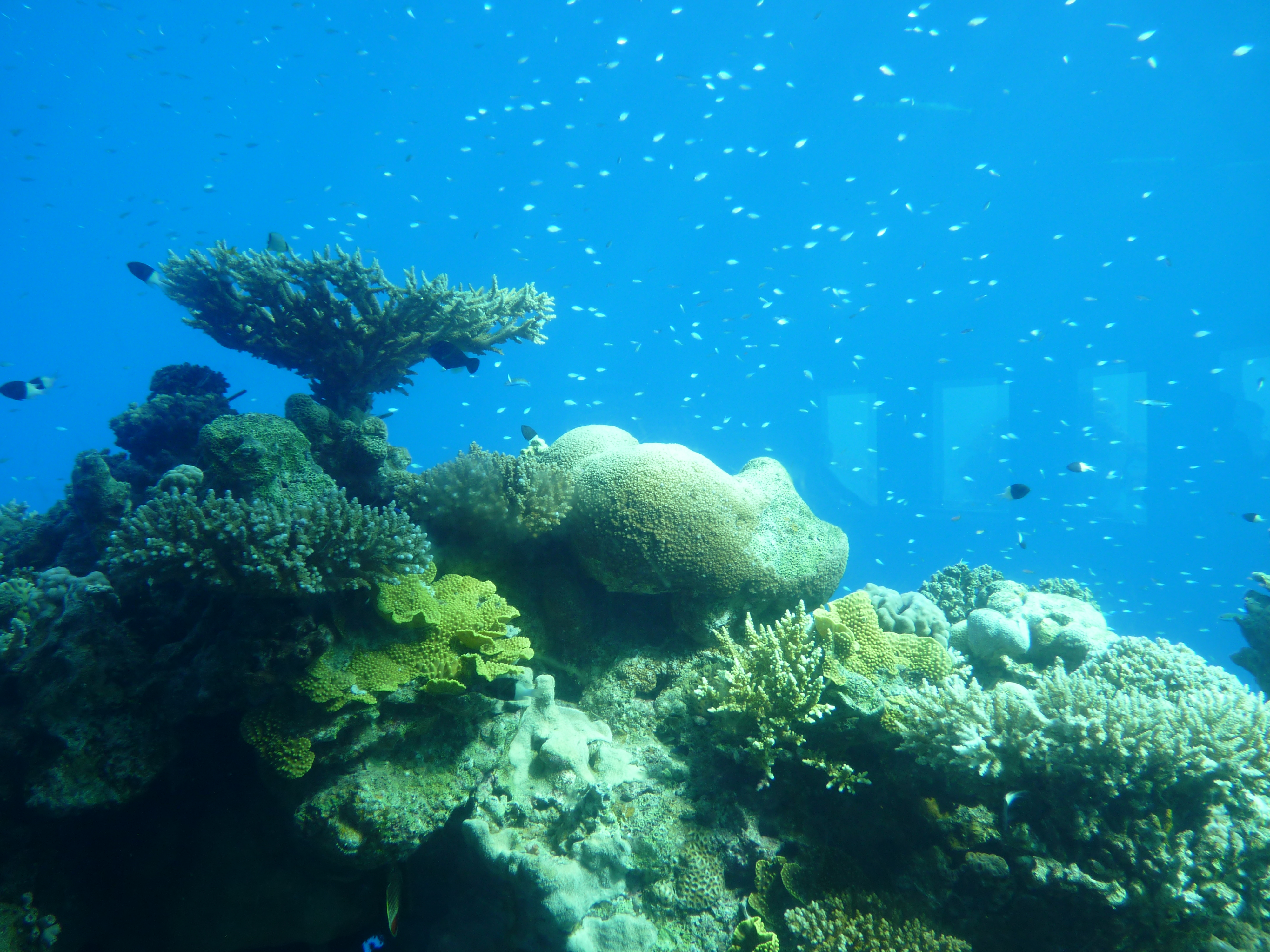 P1080801 Eilat